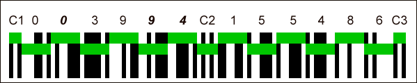 (EAN-13 Code, korrigierte Fassung 2)